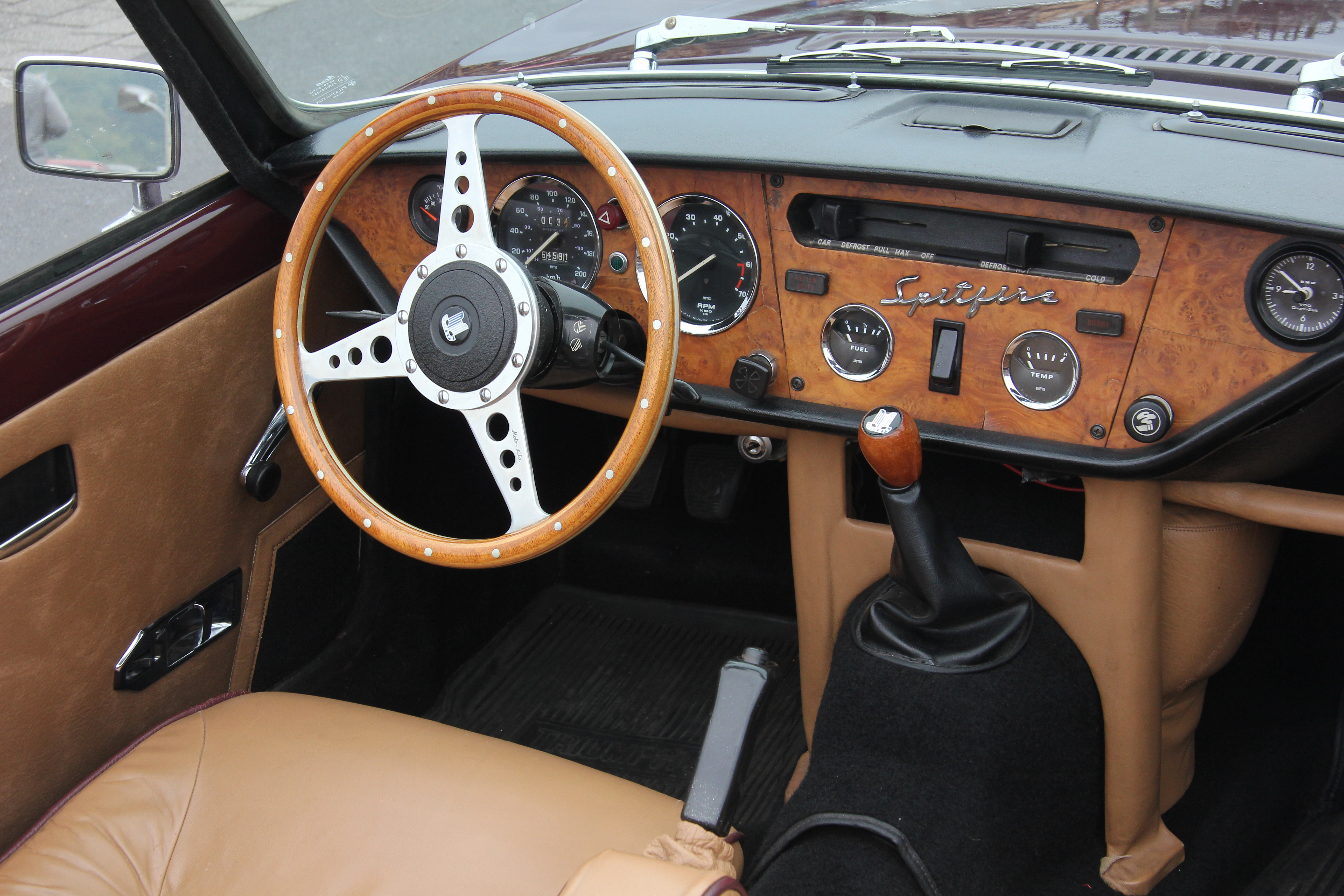 Triumph Spitfire 1500 Mk 4 (12/1974 bis 8/1980); Vierzylinder-Viertakt-Reihenmotor, 1493 cm³, 71 PS bei 5500/min, Vierganggetriebe, Höchstgeschwindigkeit 161 km/h